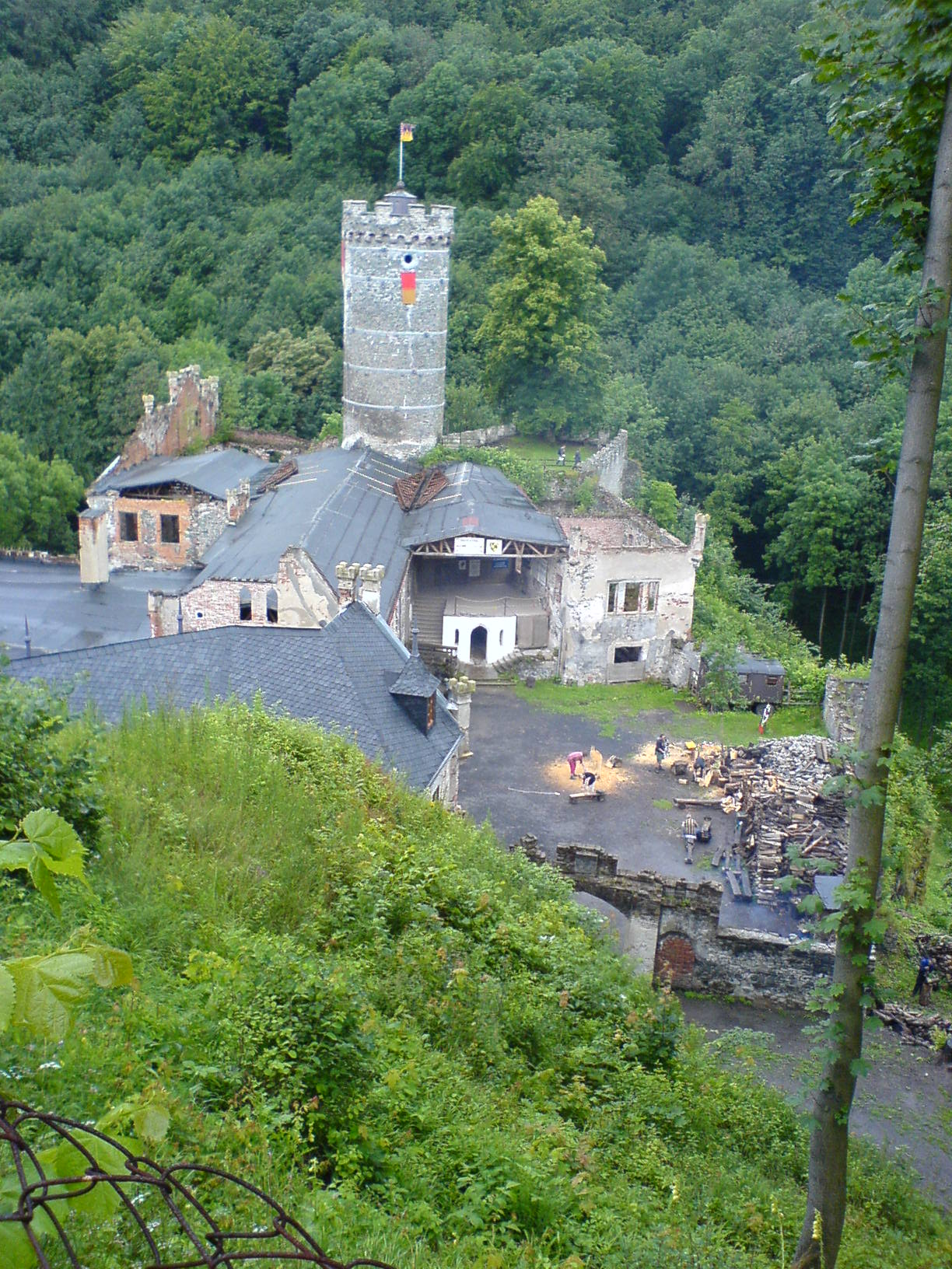 Burgo Horní hrad, distrikto Karlovy Vary, Ĉeĥio.